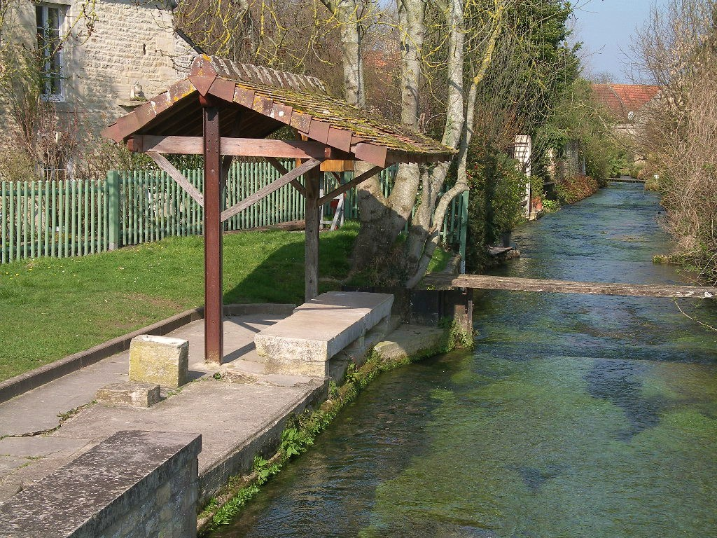 Lavoir de la place du Panitre à Reviers (Calvados)